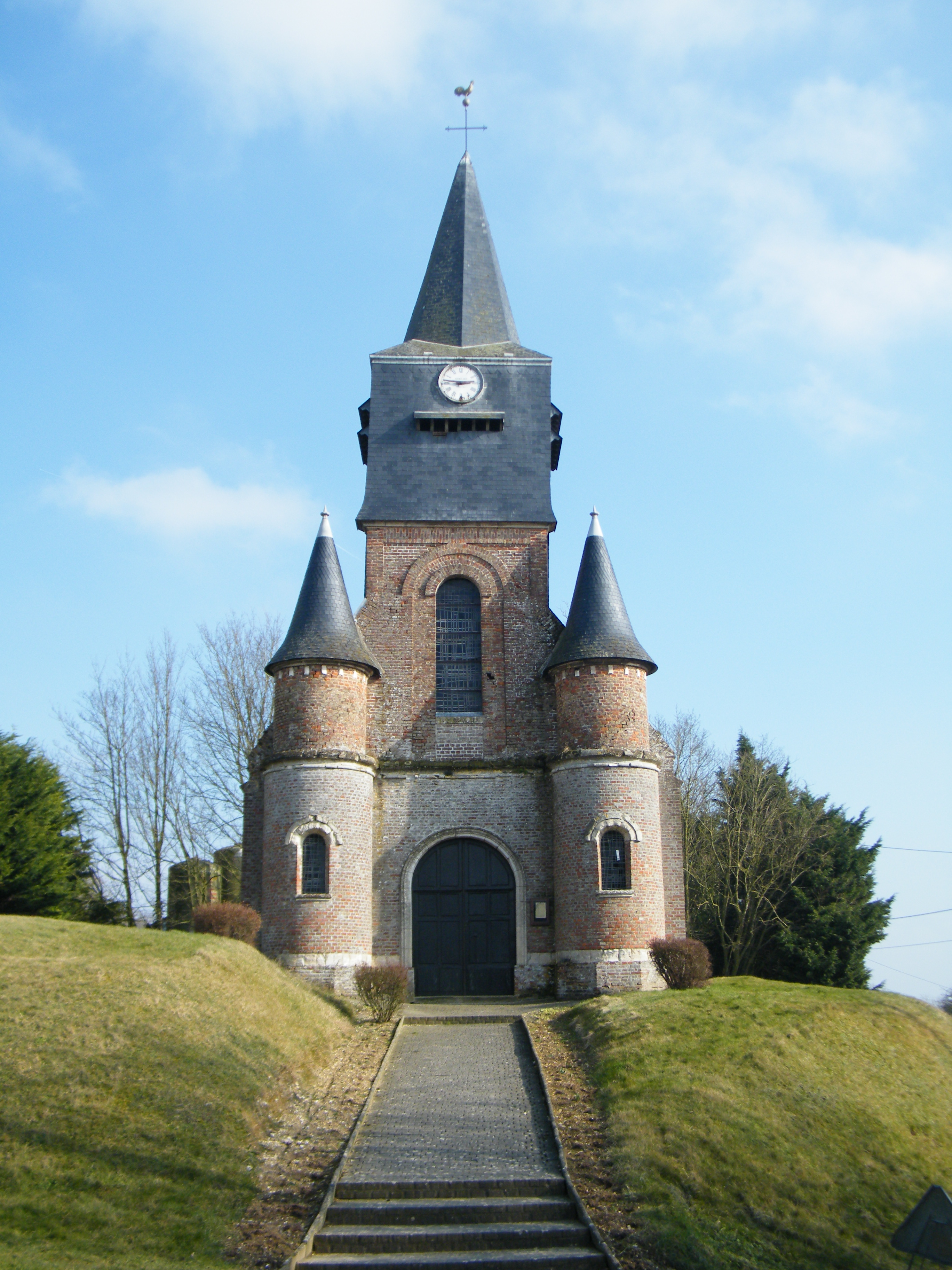 Clocher de l'église.